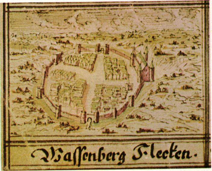 Wassenberg